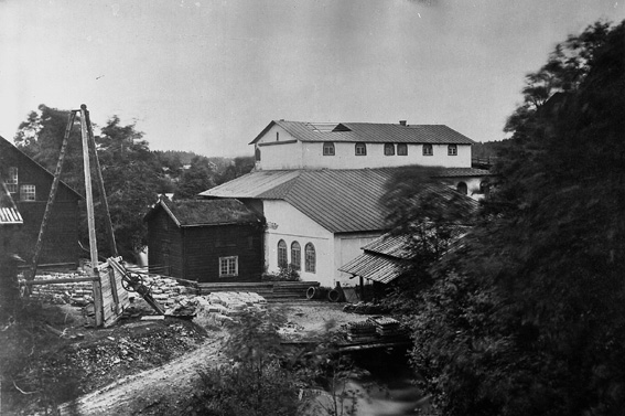 Sunnemohyttan (nedblåst 1885, och nedriven vid sekelskiftet 1900) troligtvis på 1860-talet (1867). Foto: S J Ölander.